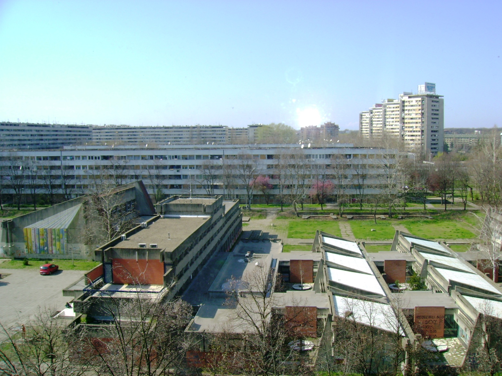 Elementary school "Ratko Mitrovic" in Belgrade/Osnovna škola "Ratko Mitrović" u Beogradu